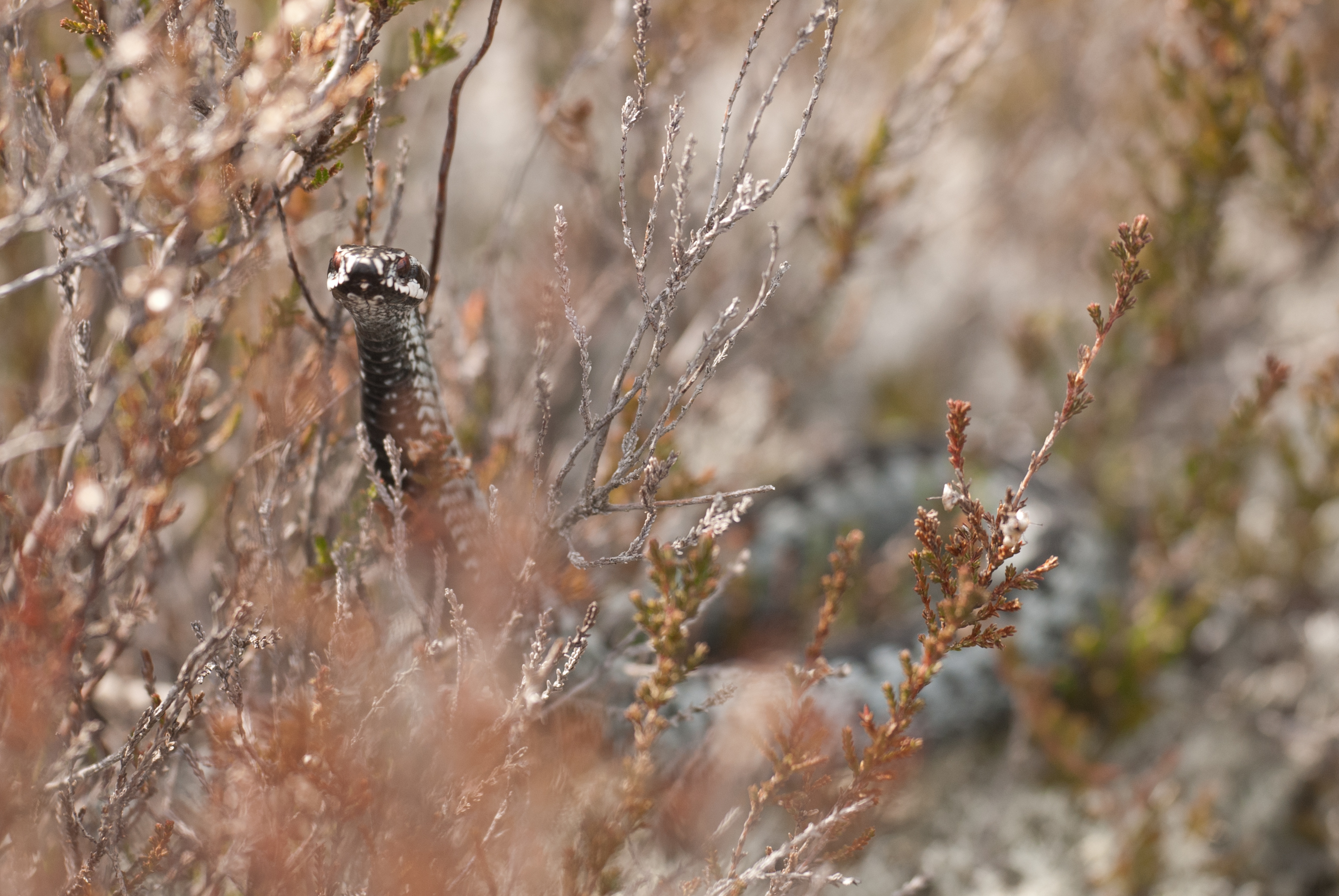 Rästik Põhja-Kõrvemaa looduskaitsealal